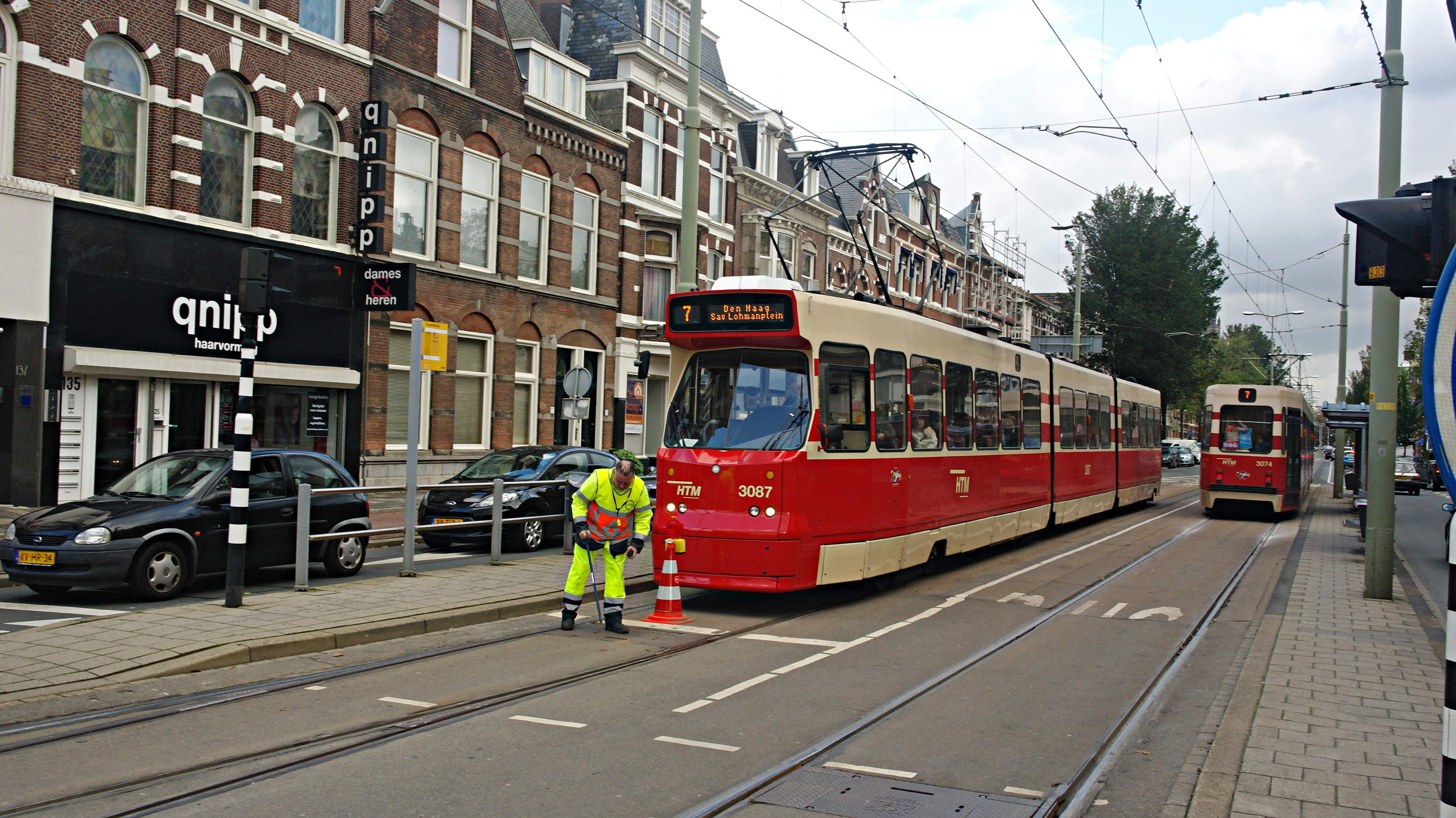 GTL 3081 op de tijdelijke tramlijn 7, 23 oktober 2014.